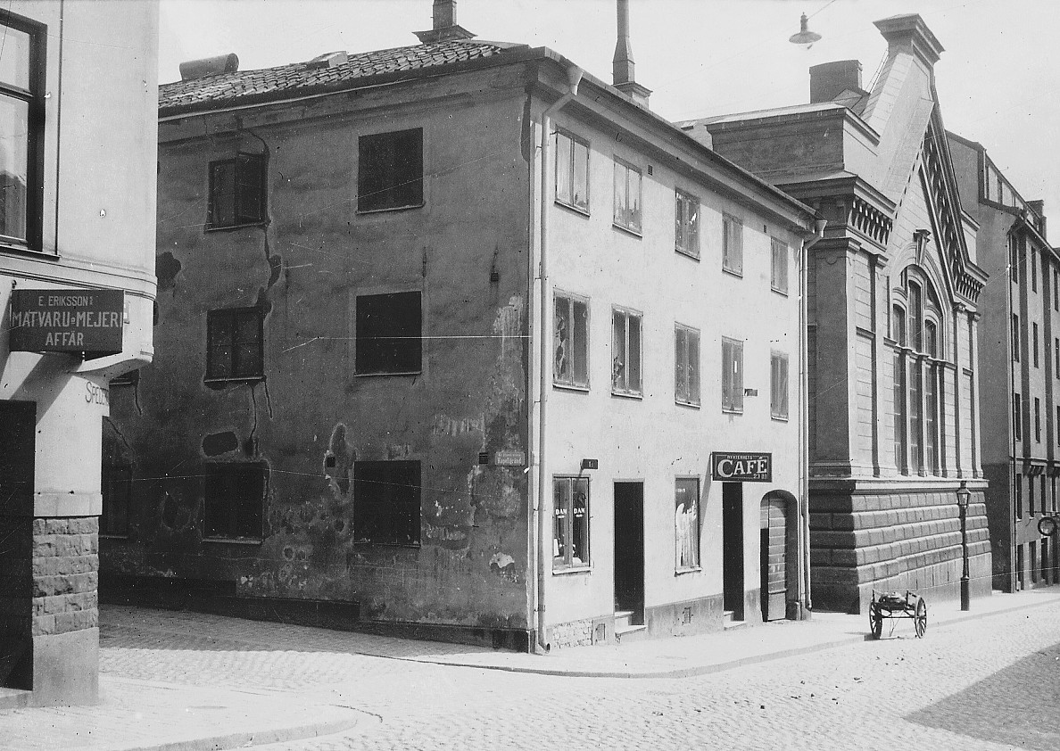 Fastigheten Sturen större 11, t.h. syns Katarina västra vårdgymnasiums gymnastikhall